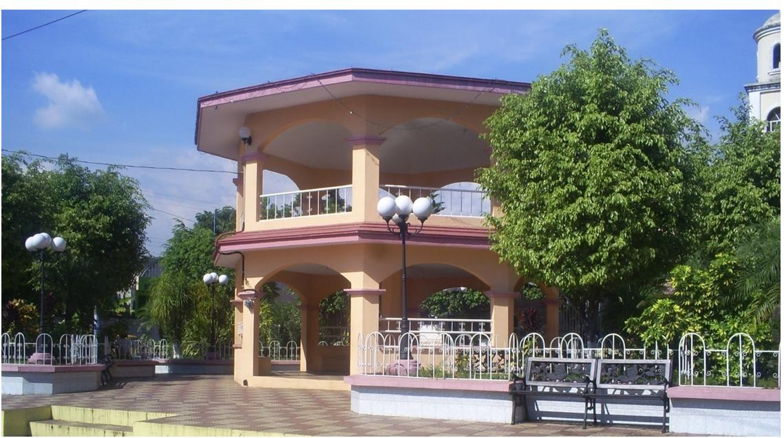 este es un vista del Parque Central de San Miguel Panán, Suchitepéquez, Guatemala